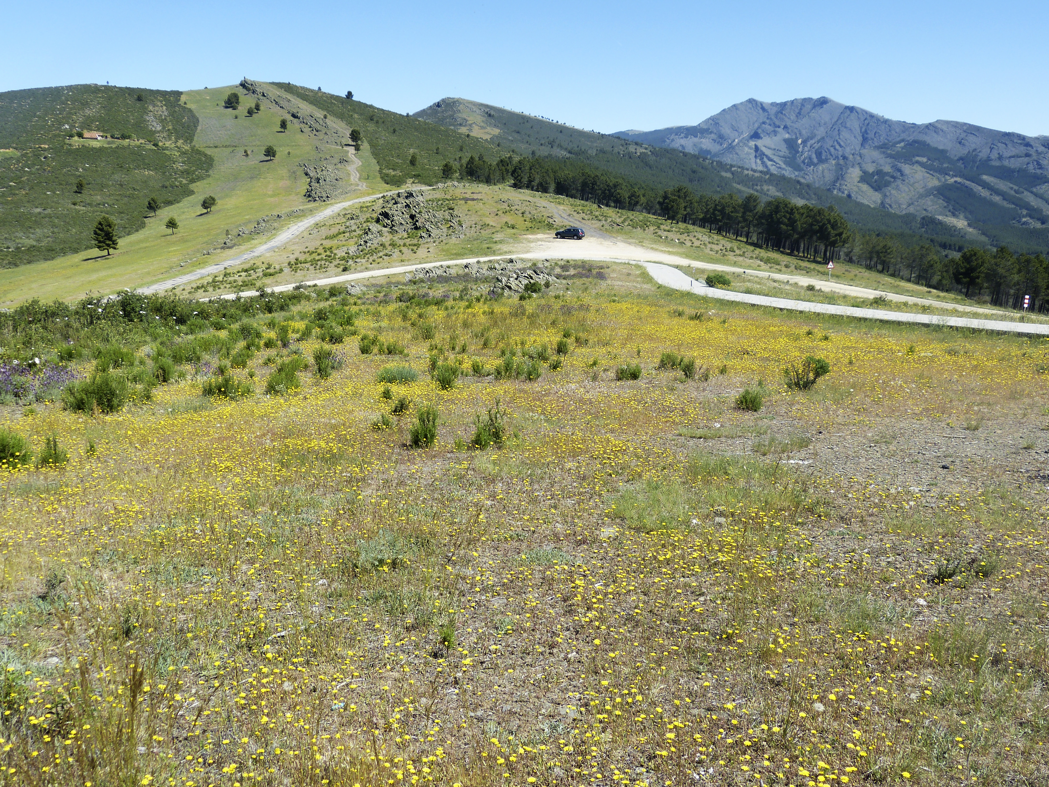 El Cerro en primavera